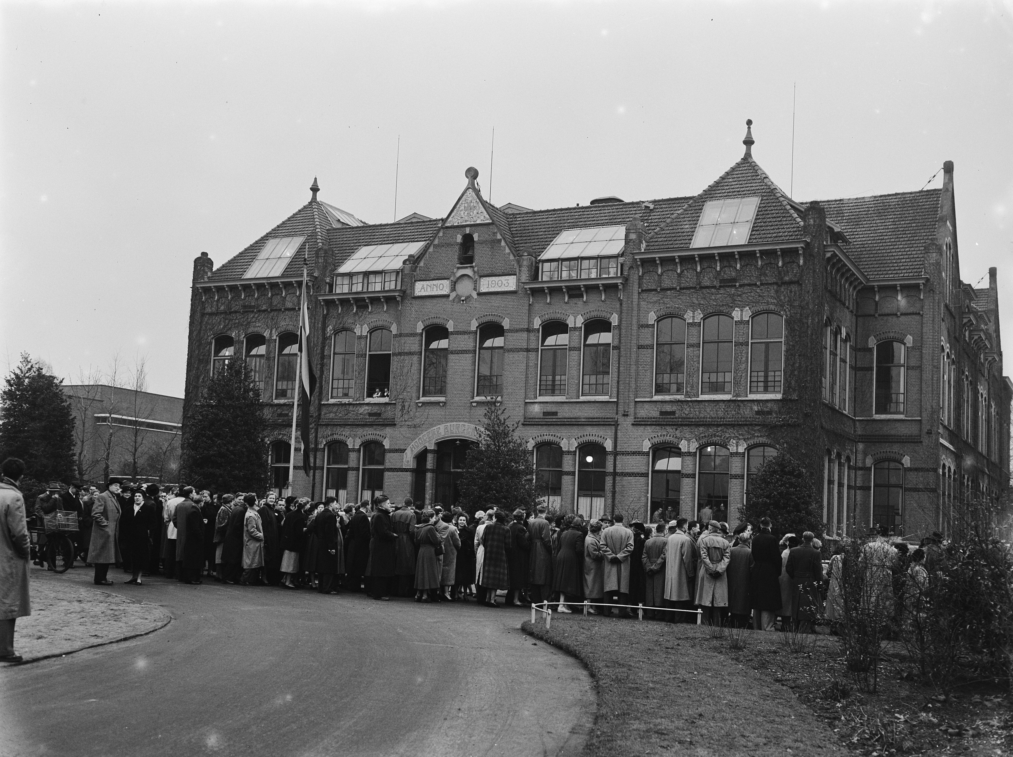 Collectie / Archief : Fotocollectie Anefo Reportage / Serie : [ onbekend ] Beschrijving : 50 jarig bestaan HBS Hilversum Datum : 12 december 1953 Locatie : Hilversum Instellingsnaam : HBS Fotograaf : Rossem, Wim van / Anefo Auteursrechthebbende : Nationaal Archief Materiaalsoort : Glasnegatief Nummer archiefinventaris : bekijk toegang 2.24.01.09 Bestanddeelnummer : 906-1768